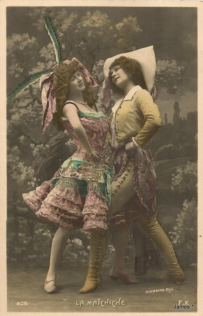 La matchiche, mattechiche ou maxixe, parfois appelée tango brésilien, danse née à Rio de Janeiro en 1868.